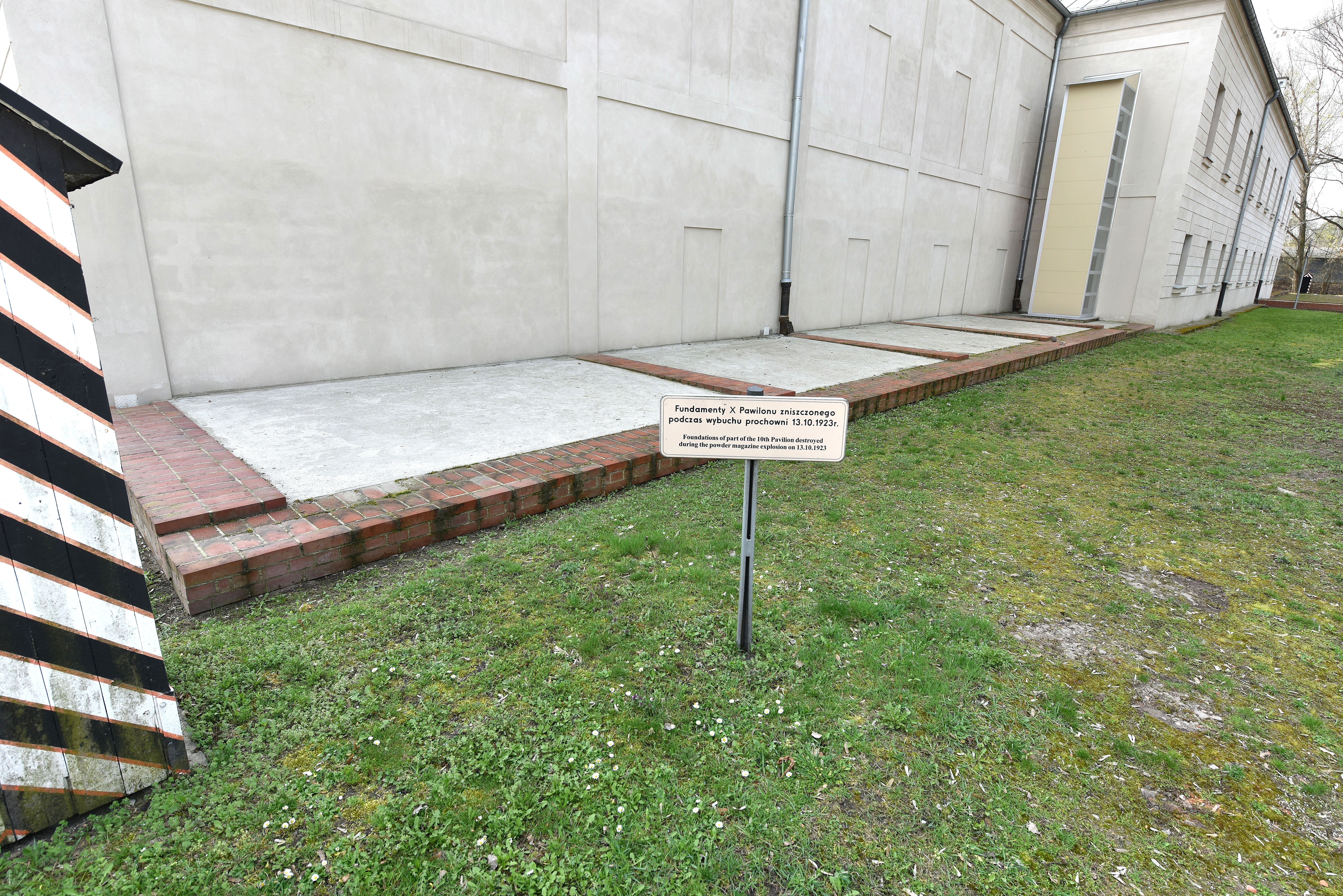 Cytadela Warszawska. Fundamenty X Pawilonu zniszczone podczas wybuchu prochowni w 1923